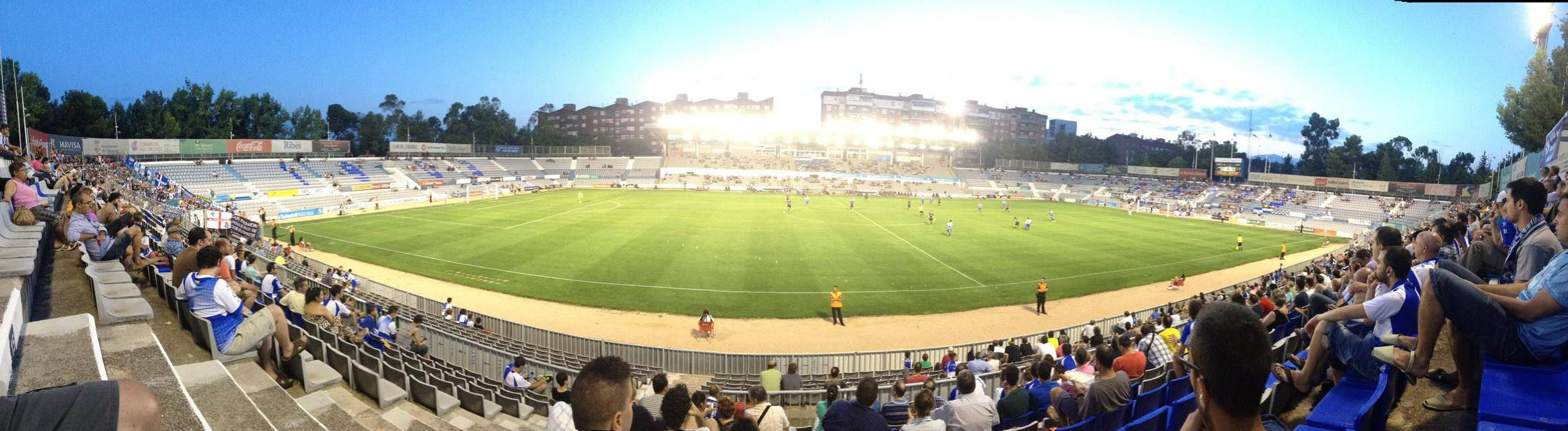 Camp del CE Sabadell al 2013 contra el RCD Espanyol.